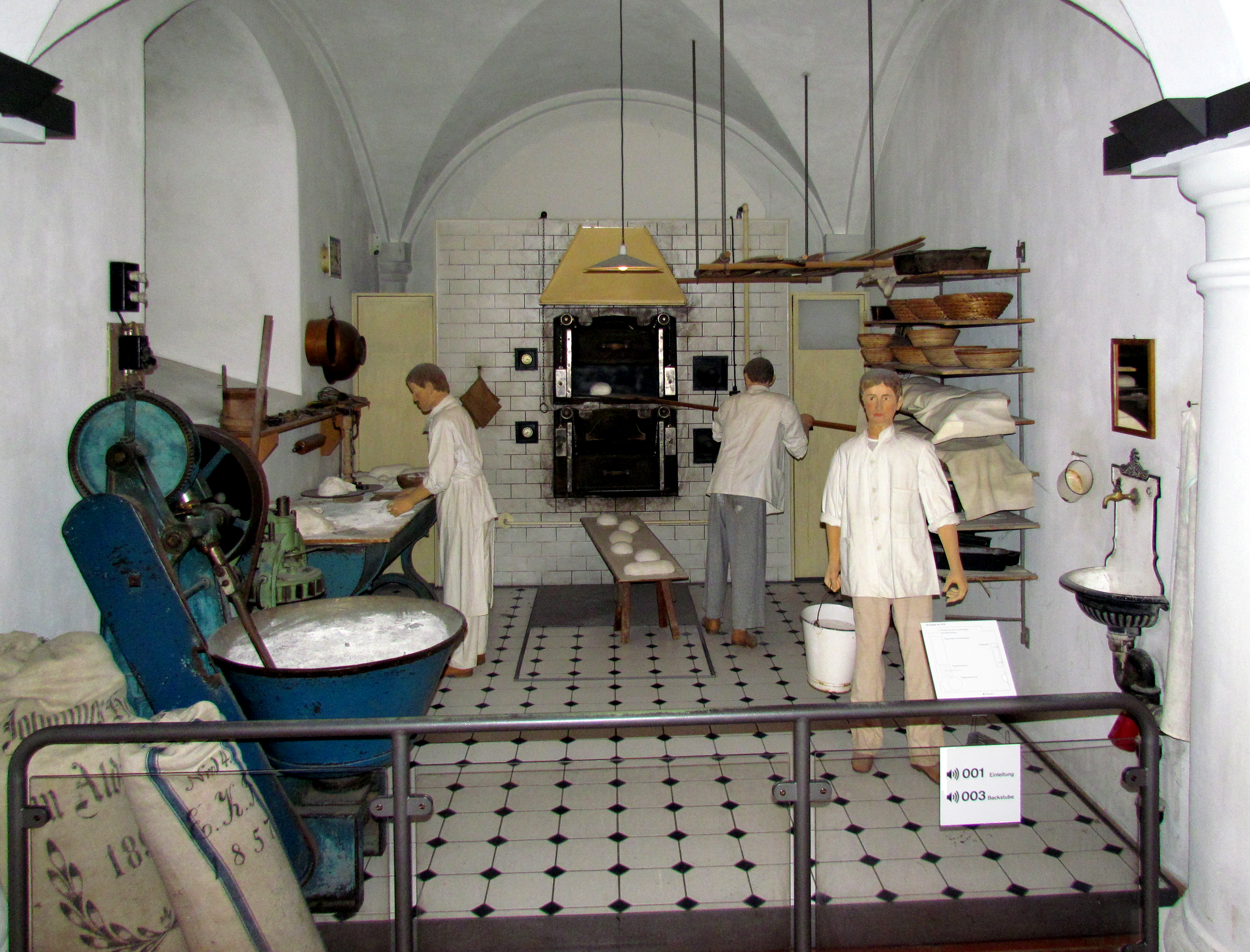 Bildinhalt: Backstube im Museum der Brotkultur in Ulm Aufnahmeort: Ulm, Deutschland